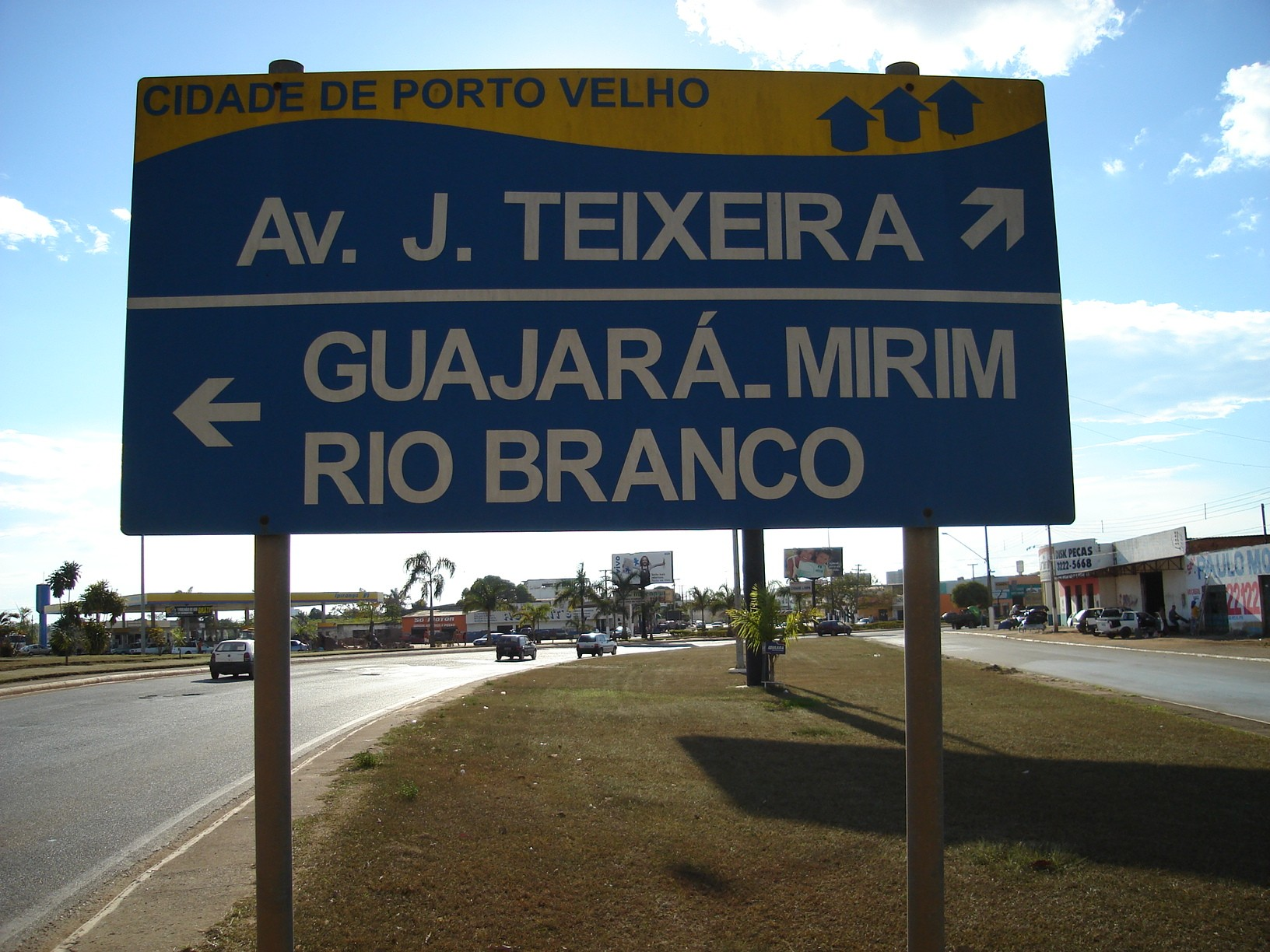 Placa de sinalização em Porto Velho, Rondônia, Brasil - Porto Velho, Rondônia, Brazil